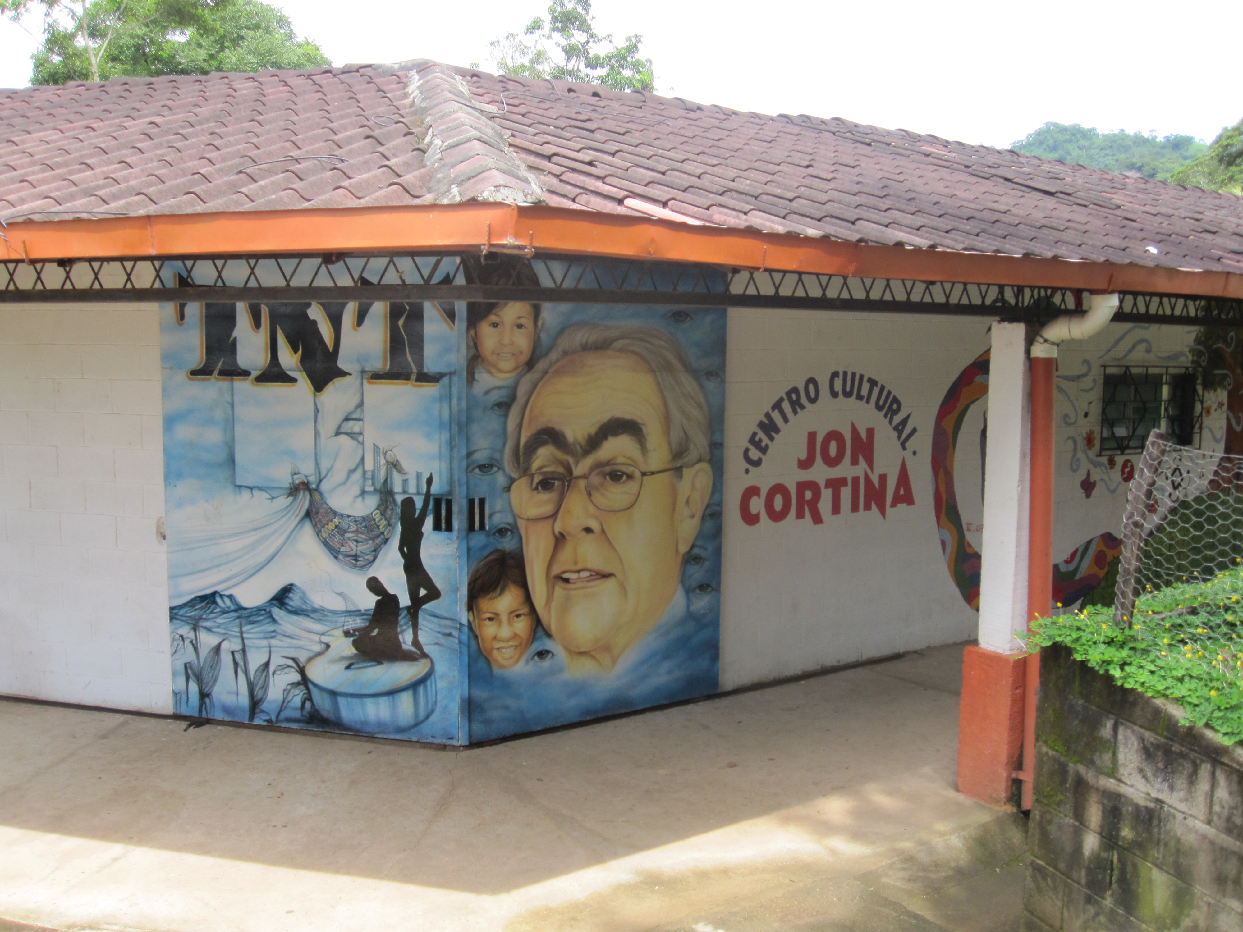 Es el Centro Cultural Jon Cortina (San Antonio Los Ranchos), donde se encuentra ubicado la Asociación Tiempos Nuevos Teatro (TNT)